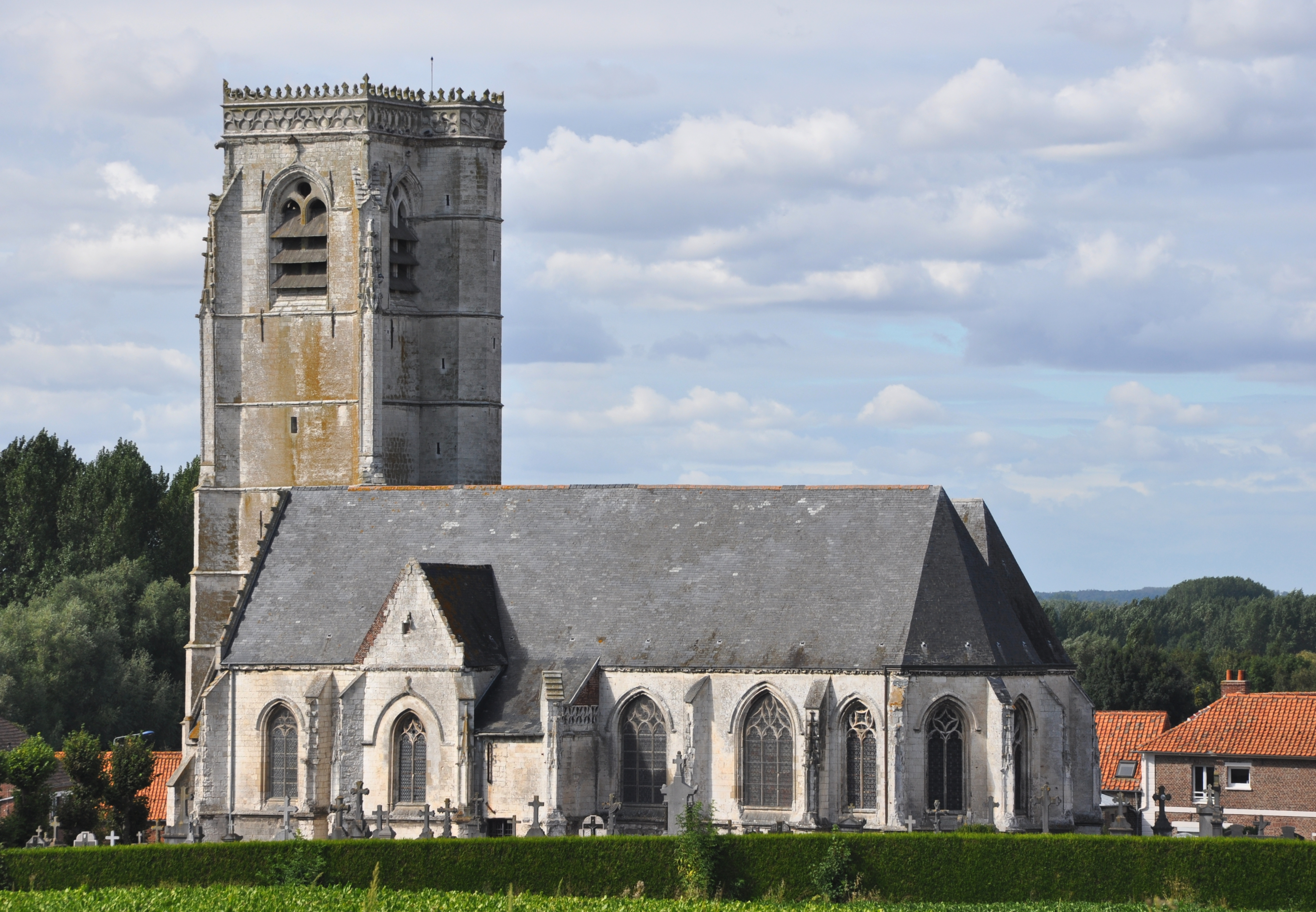 Église Saint-Lambert de Lambres, (Classé, 1913) .